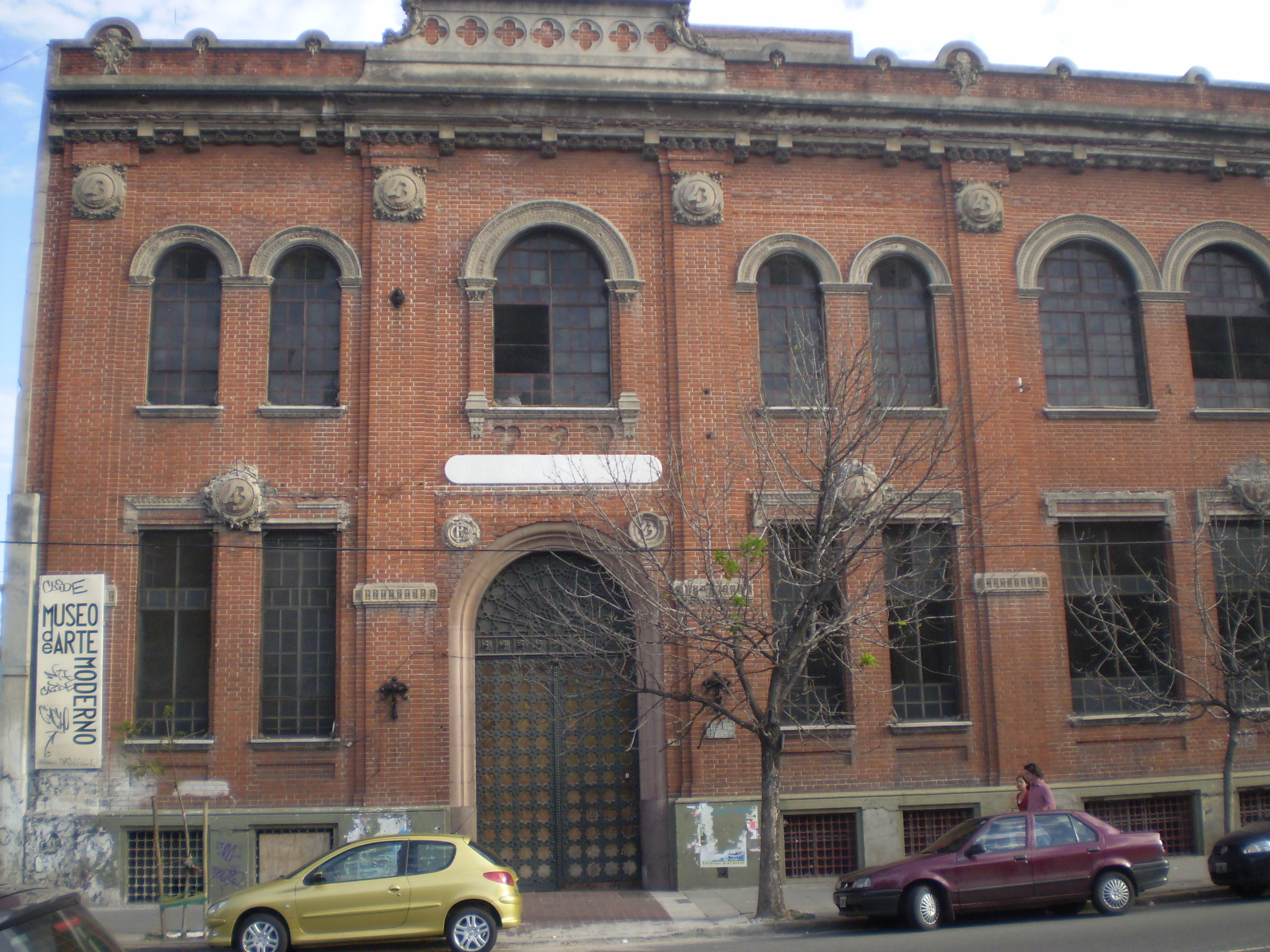 Fachada del Museo de Arte Moderno de Buenos Aires